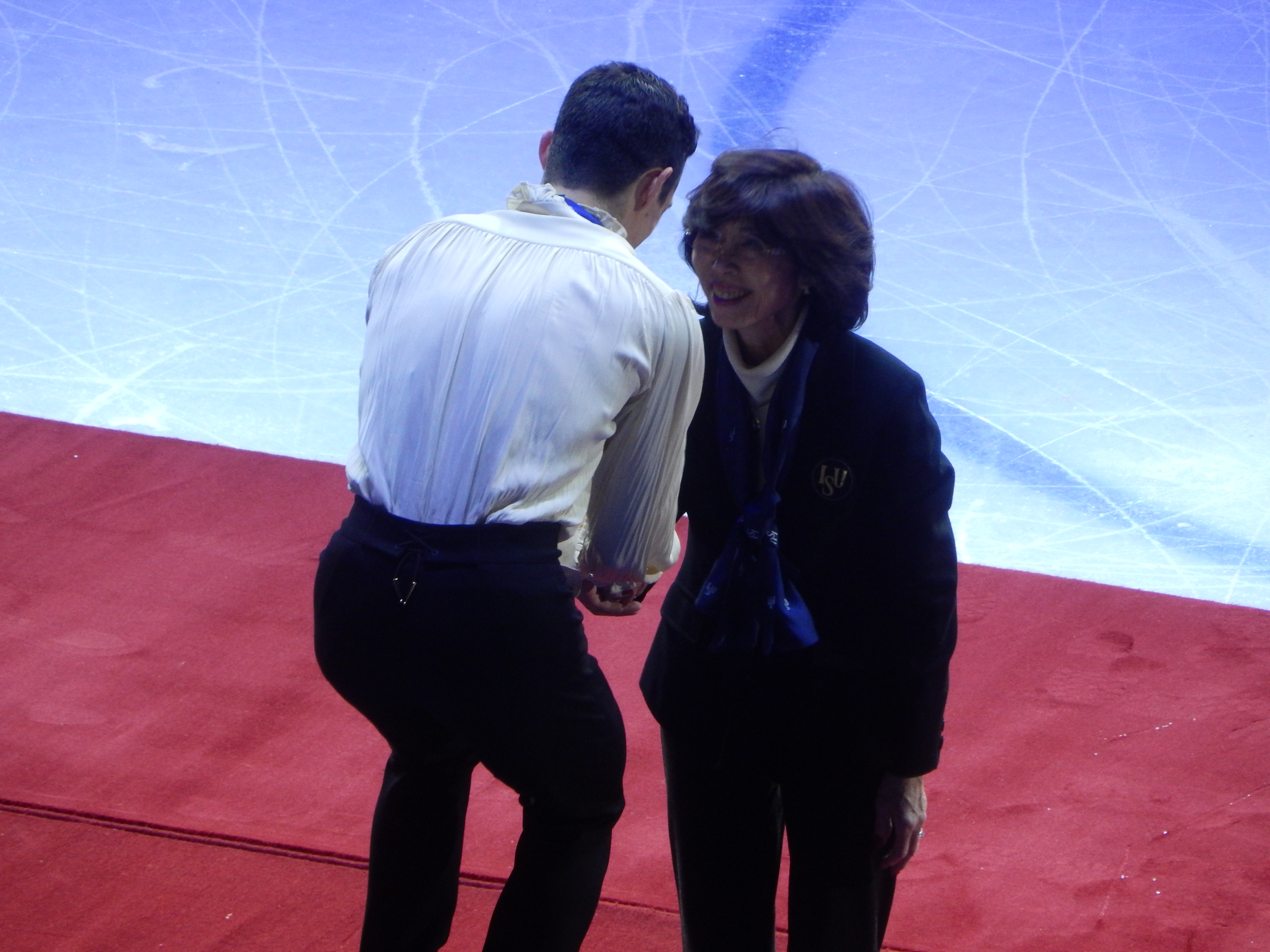 Чемпионат Европы по фигурному катанию 2018 в Москве. Третий день соревнований (19 января). Дзюнко Хирамацу награждает Хавьера Фернандеса (Испания) золотой медалью чемпионата Европы 2018, ставшей для него шестой на первенствах Старого континента